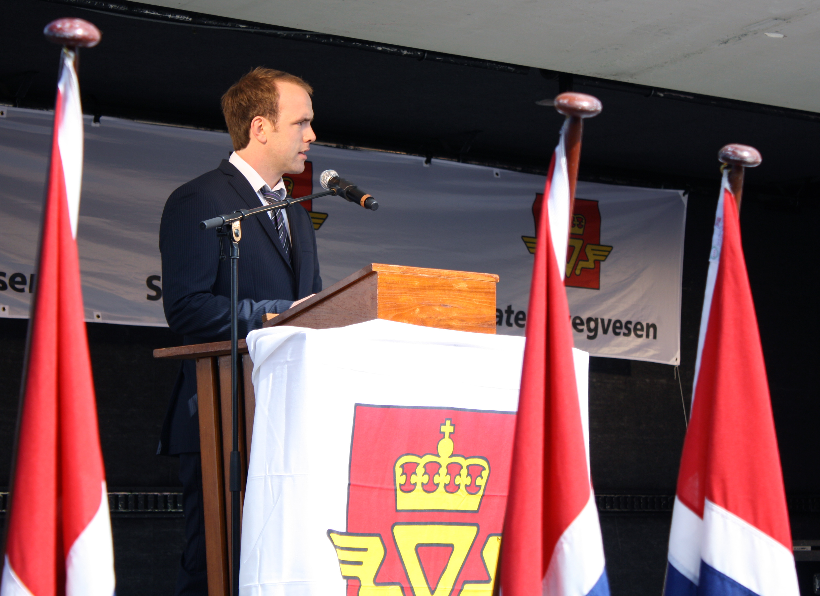 Statssekretær Lars Erik Bartnes holder tale i forbindelse med åpningen av Nordre avlastningsveg.